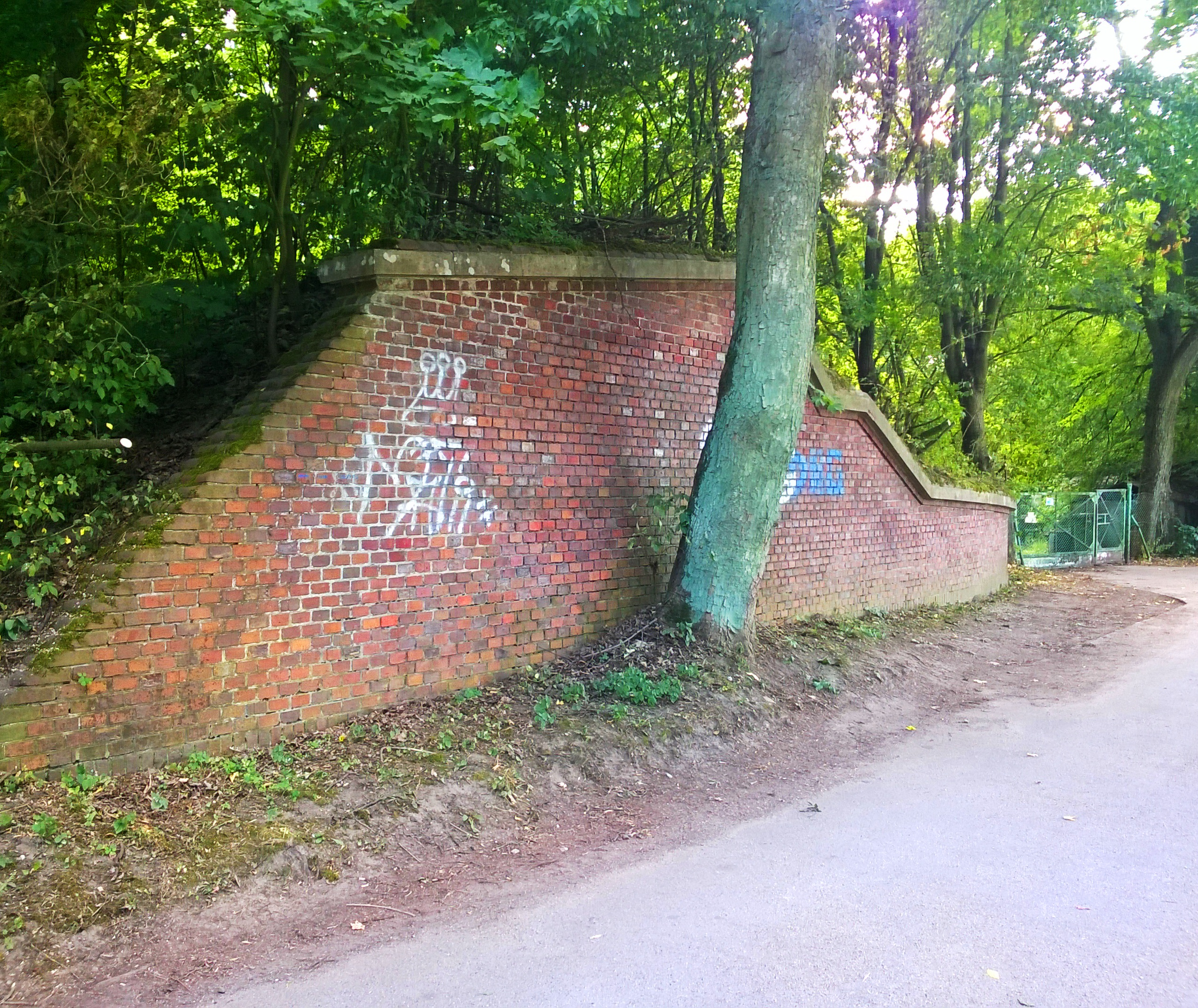 Fortyfikacje Twierdzy Toruń, Kępa Bazarowa w Toruniu